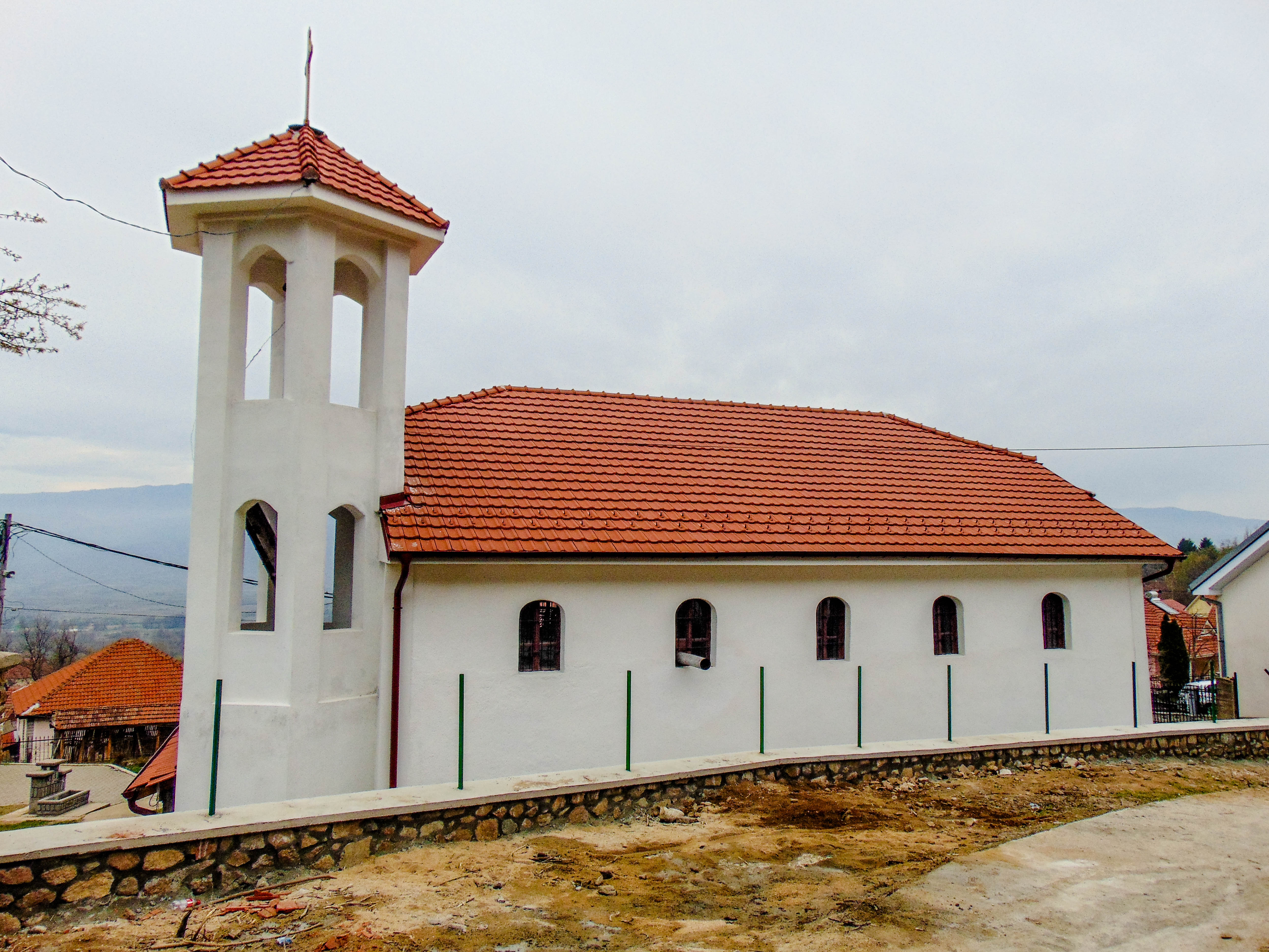 Црква „Св. Константин и Елена “ - Мокрино